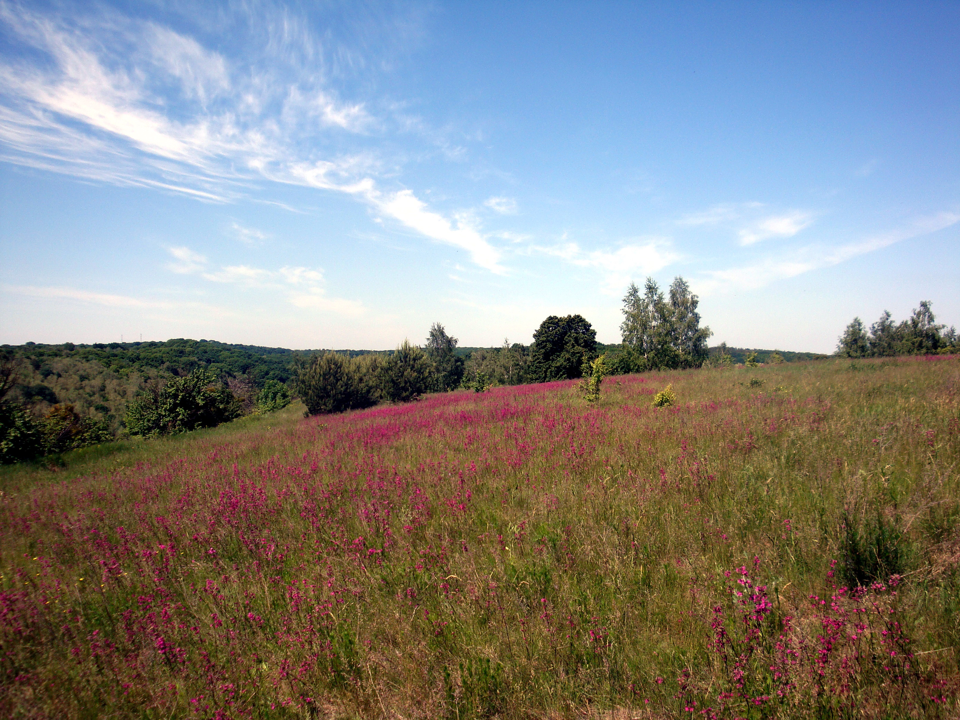 Канівський природний заповідник, м. Канів, Золотоніський район: адмінмежі Бубнівсько-Слобідської сільської ради; Канівський район, адмінмежі Пекарівської, Прохорівської, Хмільнянської, Яблунівської сільських рад